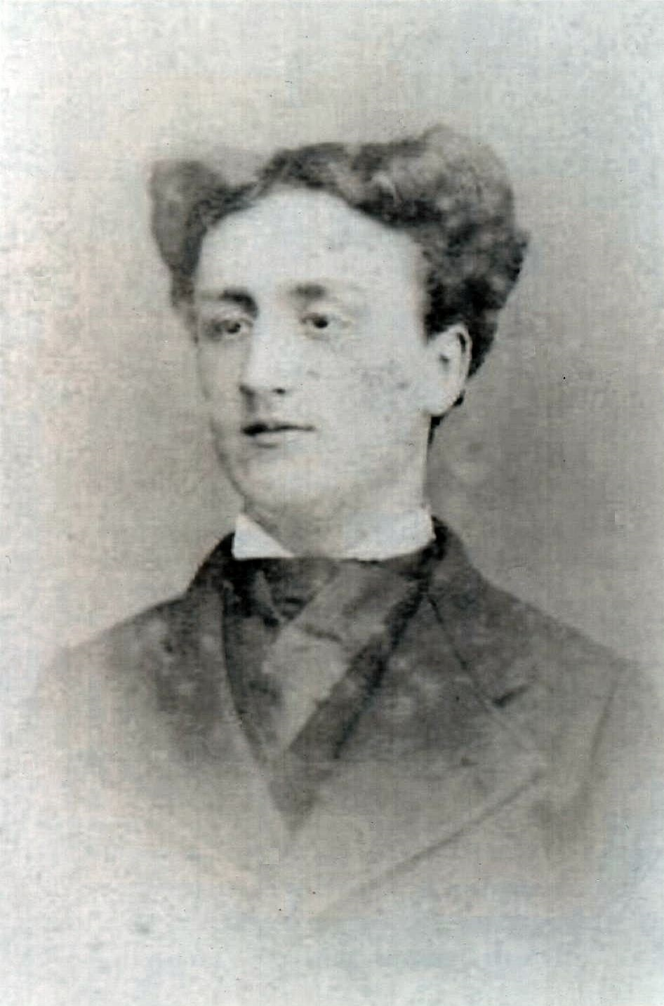 sans flah